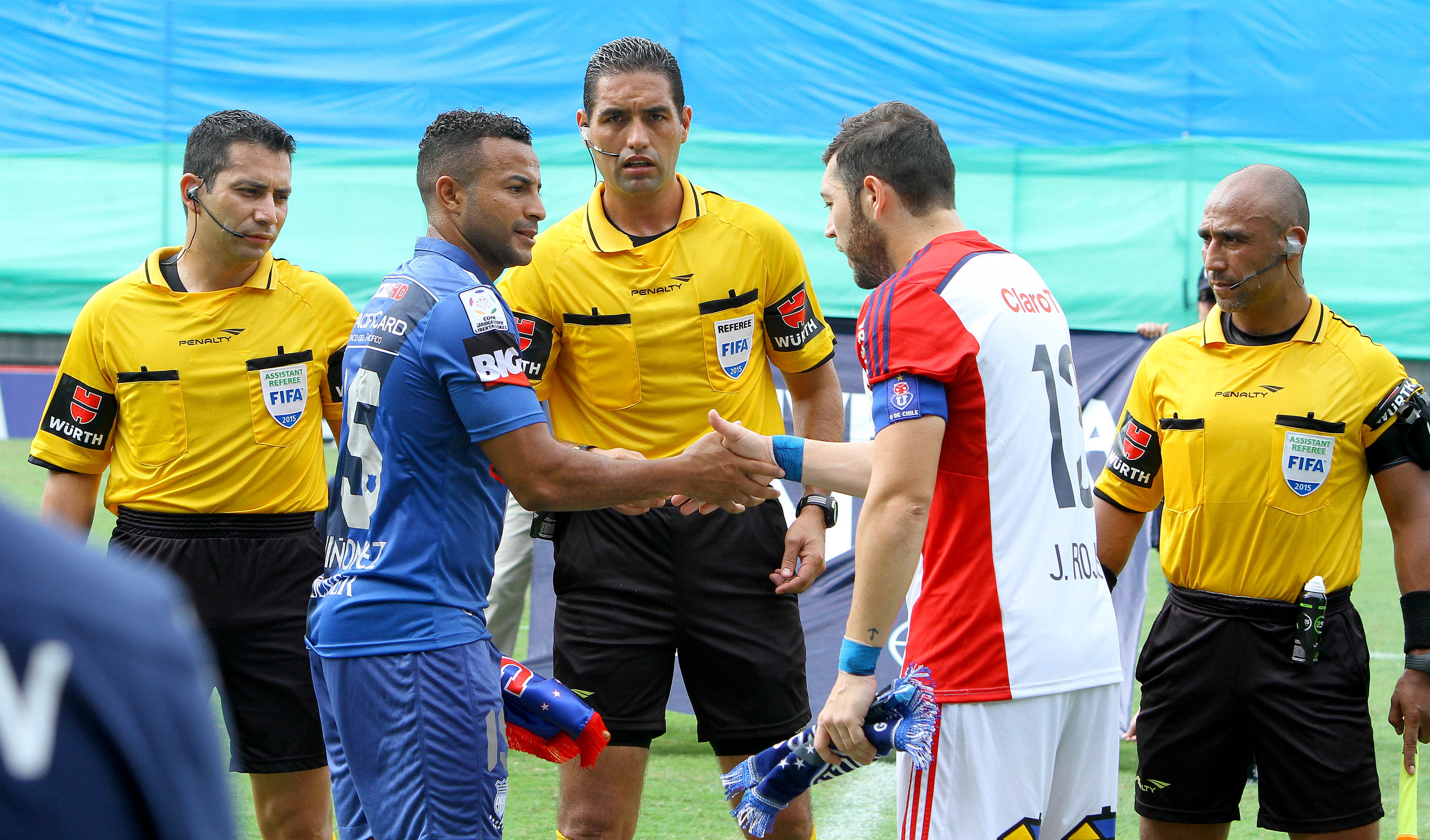 Guayaquil, 22 de abr (Andes).-Emelec se enfrenta a la Universidad de Chile en el estadio Capwell, en la gráfica Pedro Quiñonez de Emelec y José Rojas de la U de Chile Foto:César Muñoz/Andes